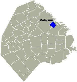 Palerm Chico, Buenos Aires